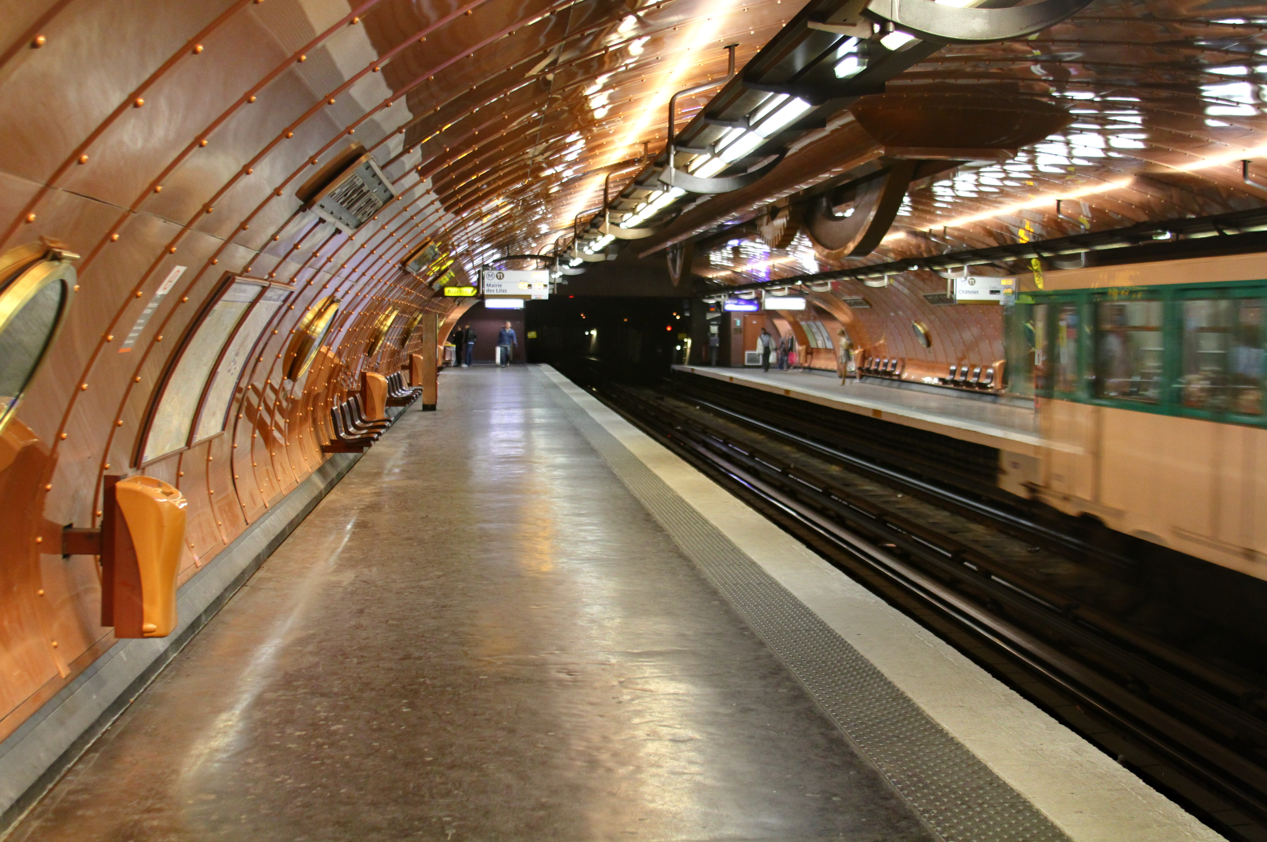 Arts et Metiers station, Paris.